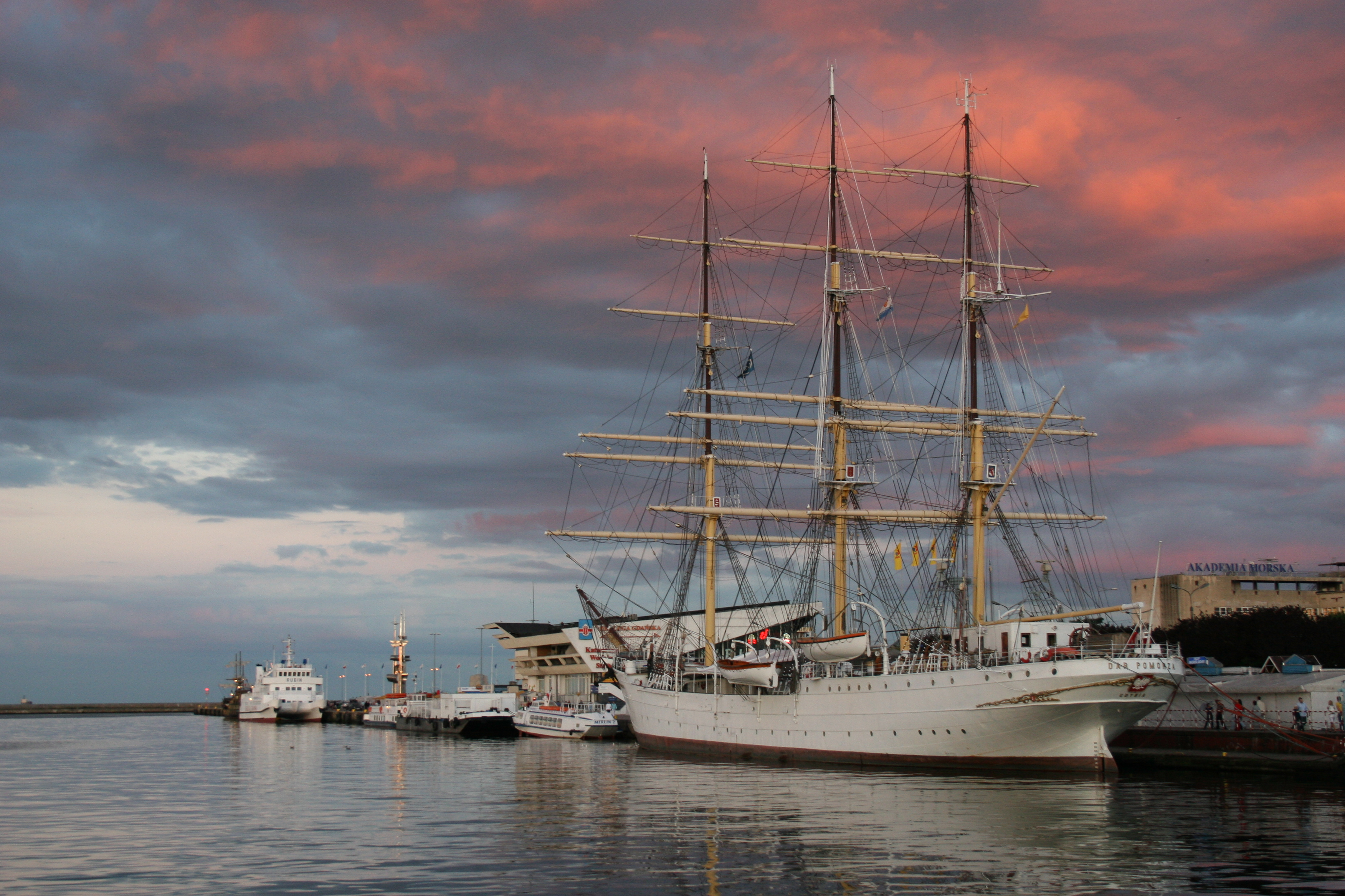 Zdjęcie powstało na Skwerku Kościuszki.